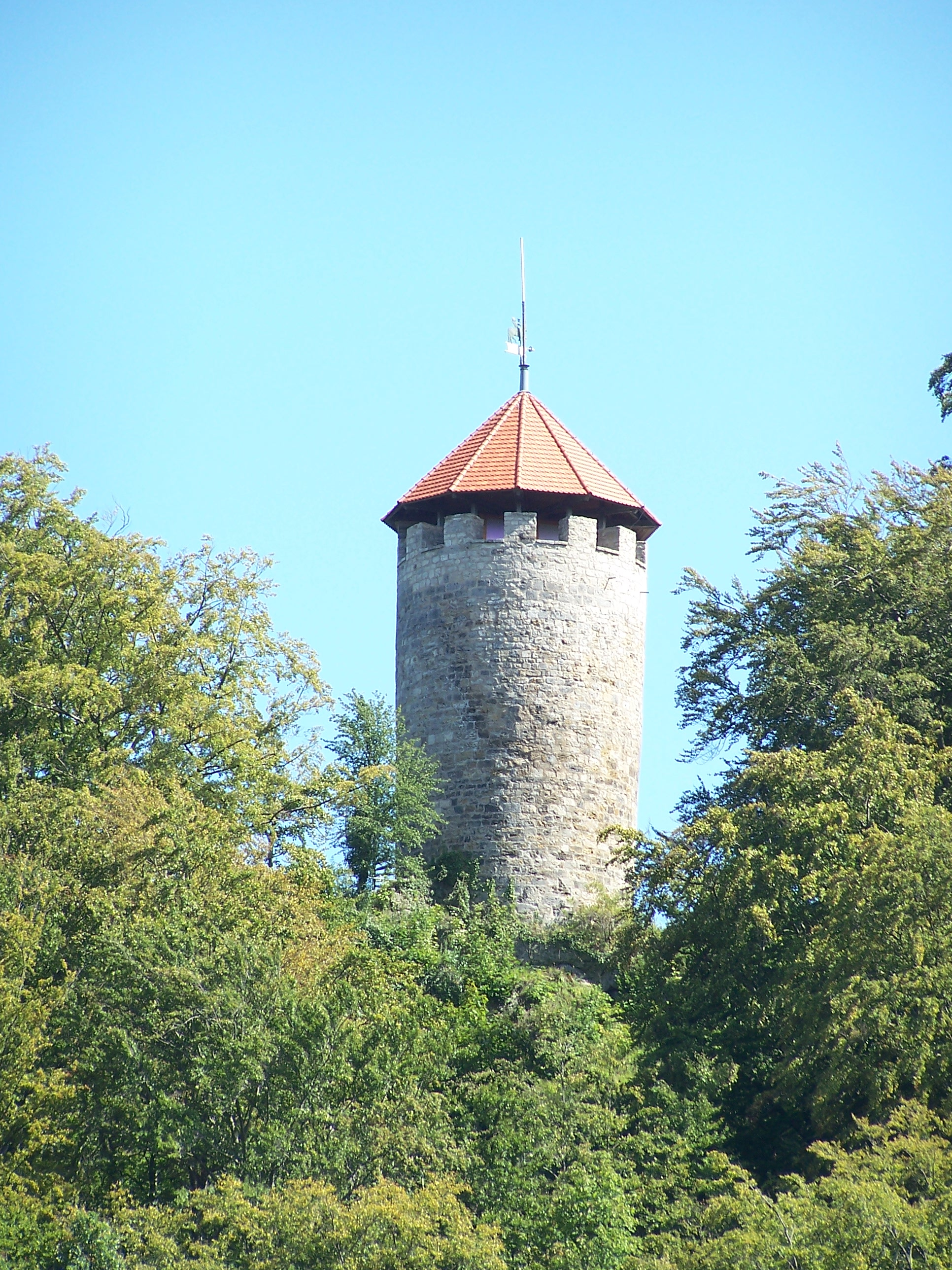 Der Turm der Scharfenburg - vom Schossberg aus gesehen.